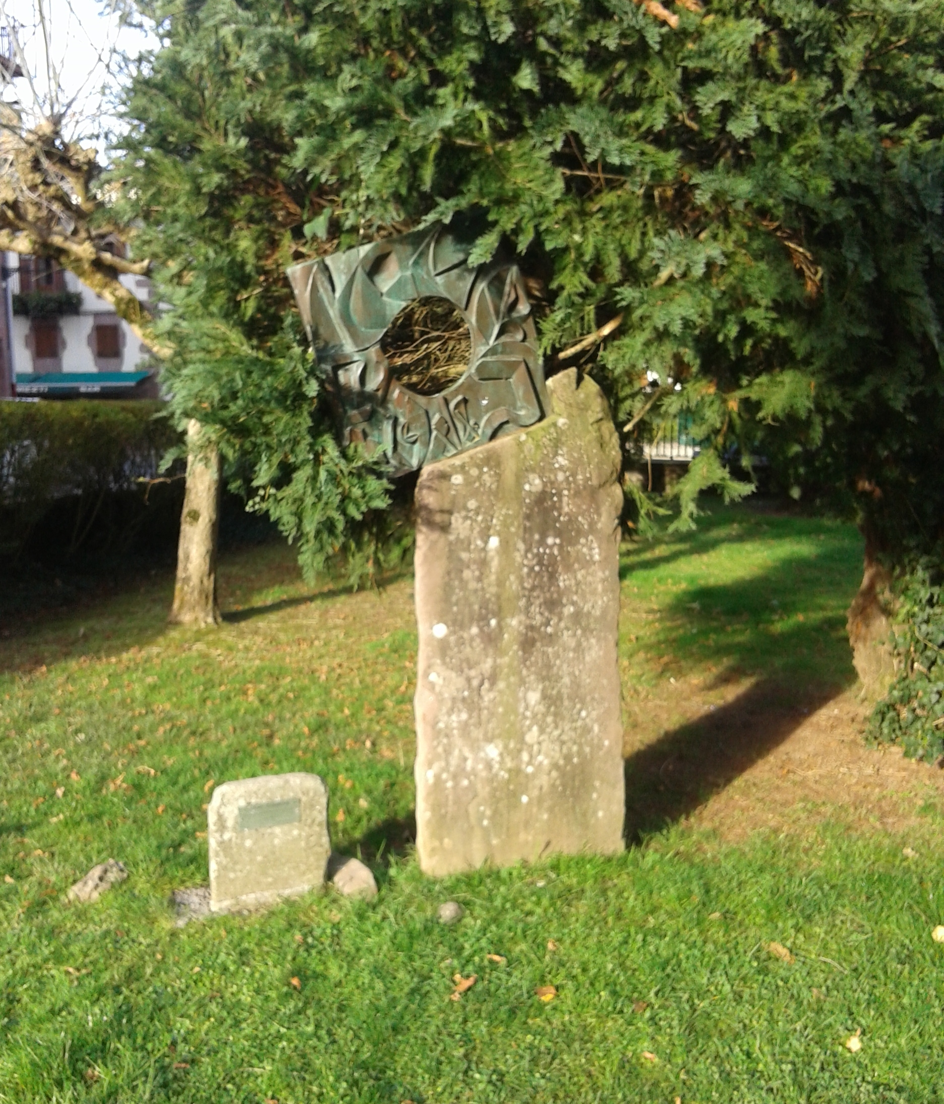 Xabier Santxotenaren eskultura Elizondoko Abesbatza Aita Donostiari eskainita.